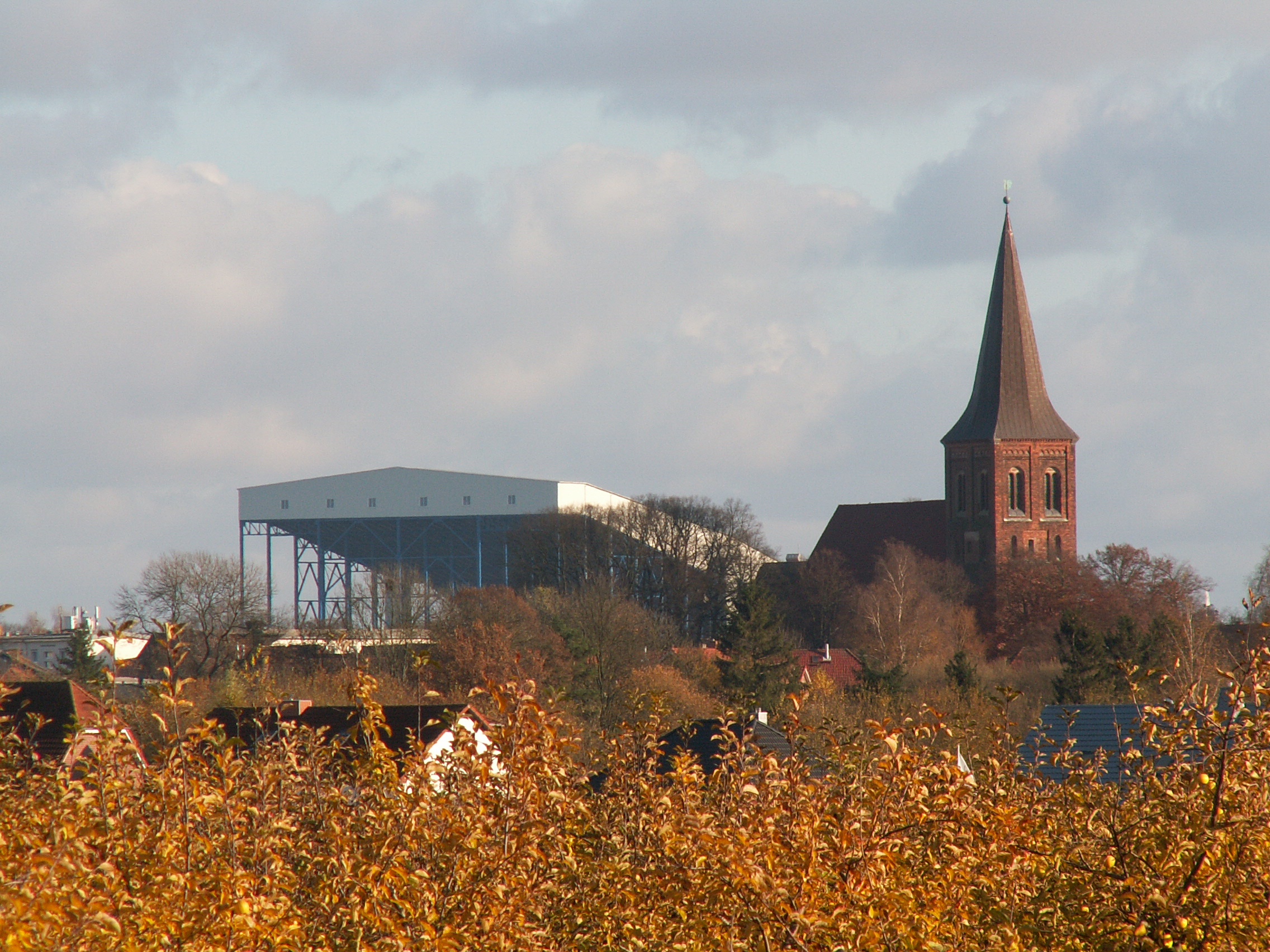 Wittenburg mit Kirche und SnowFun-Anlage (Skihalle / Alpincenter Wittenburg), Mecklenburg-Vorpommern